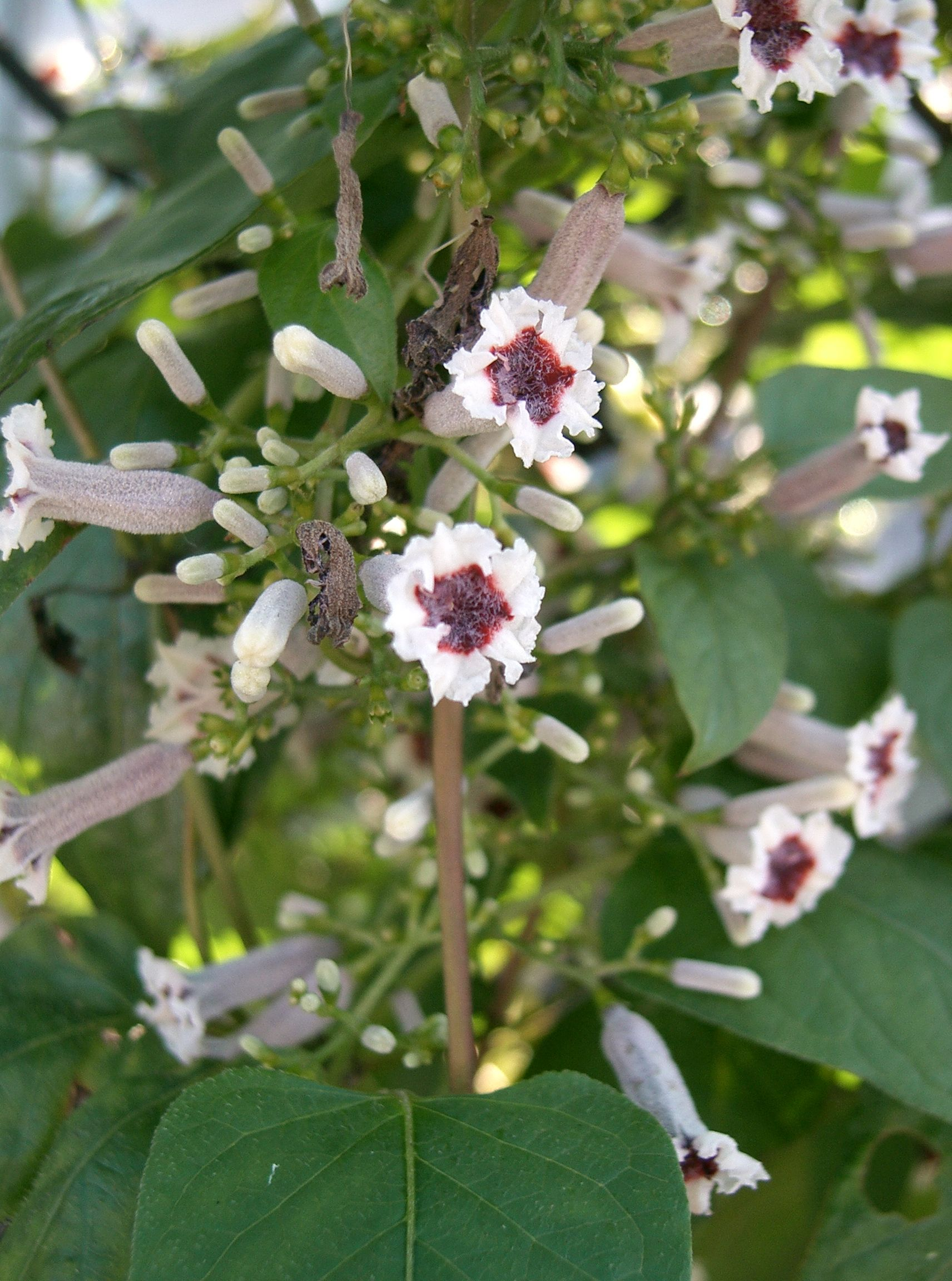 Paederia scandens